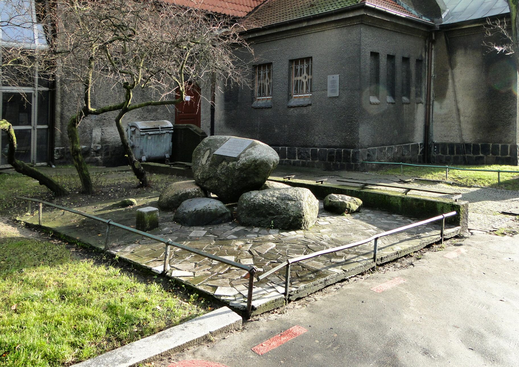 Pomnik jeńców francuskich na Placu Andersa w Szczecinie